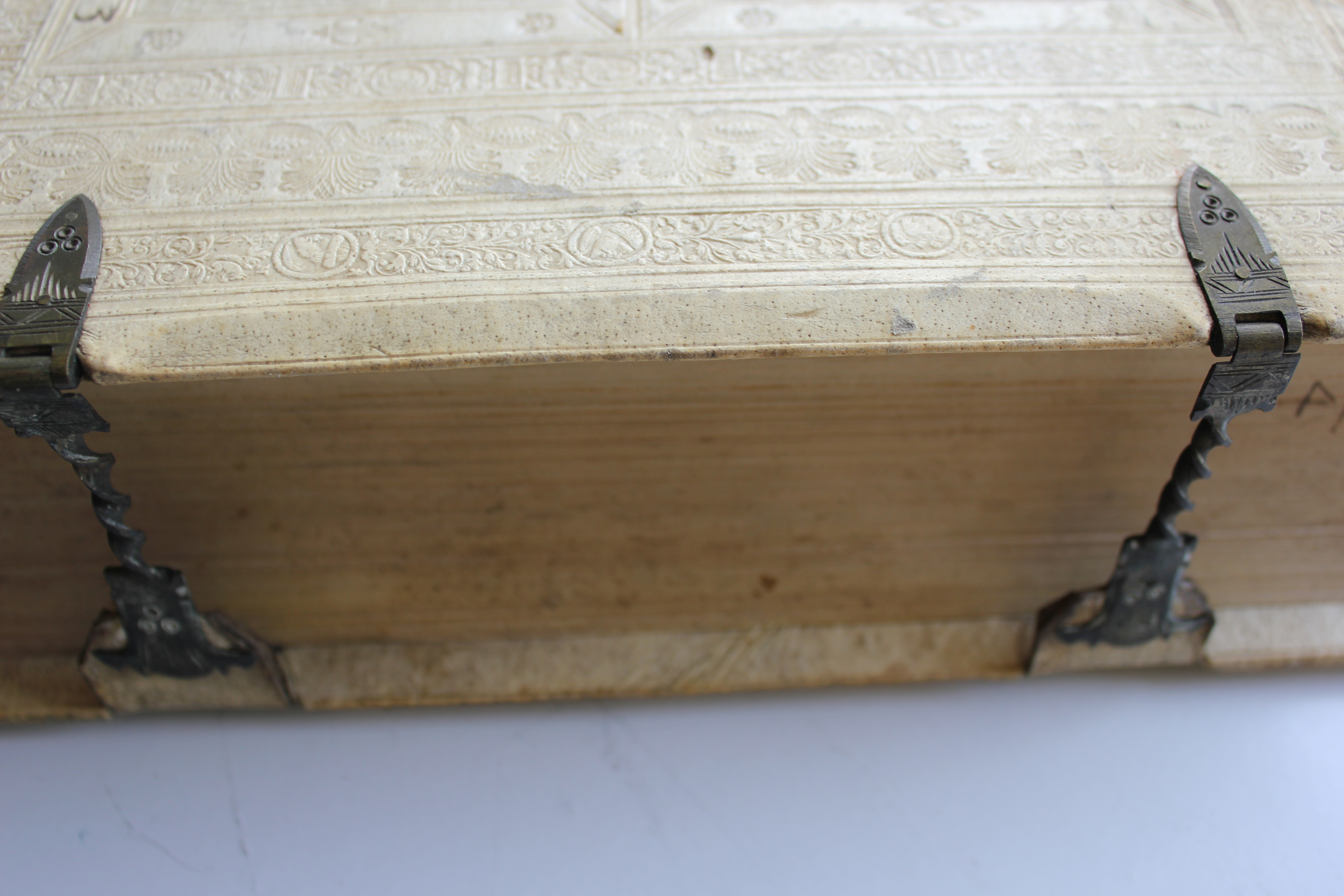 LZB in Flensburg - Tomus Quartus Omnium Operum Reverendi Domini Martini Lutheri 1552, Buch mit Spangen (zu Buch aufschlagen), Bild 04